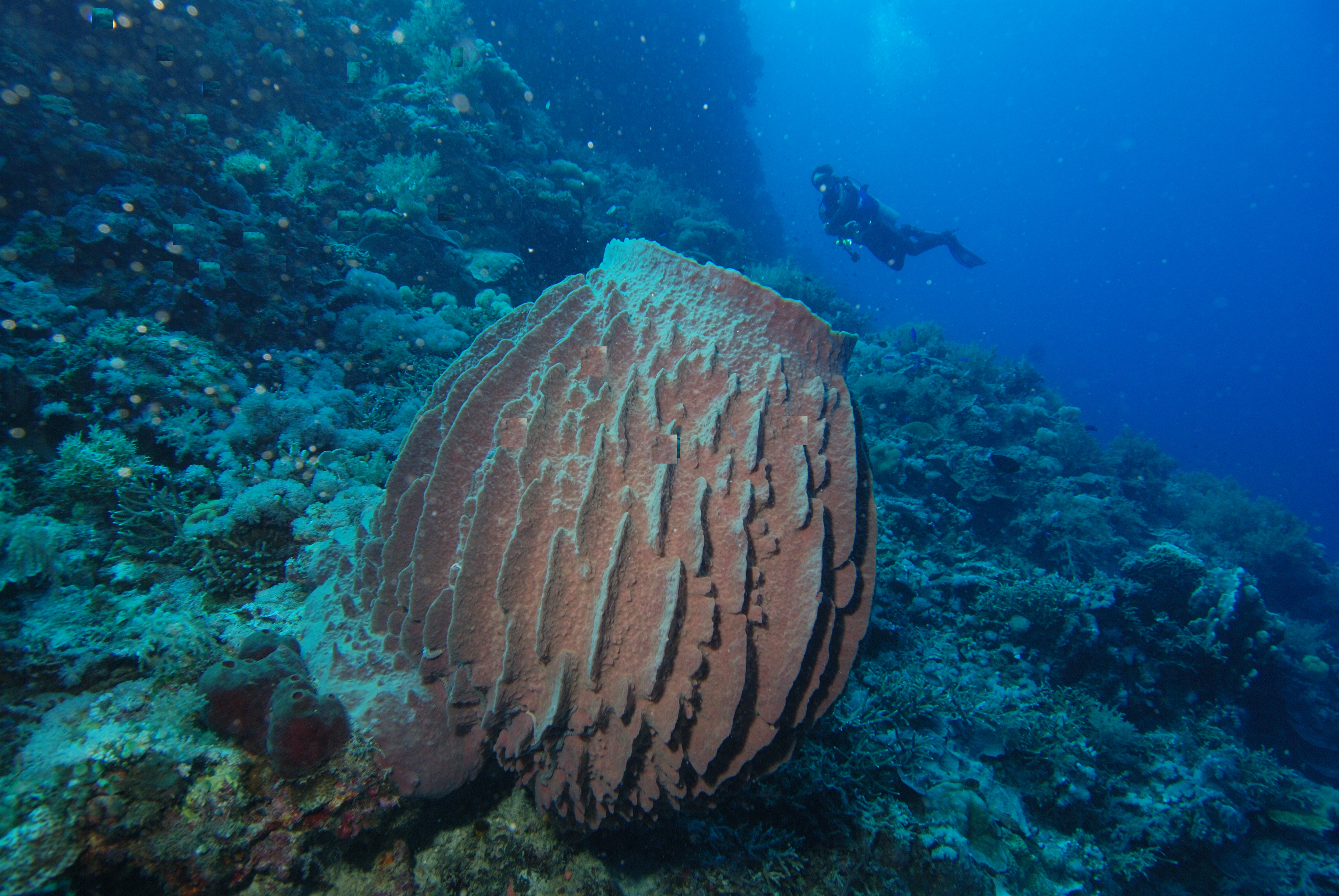 Vaasspons (xestospongia testudinaria)